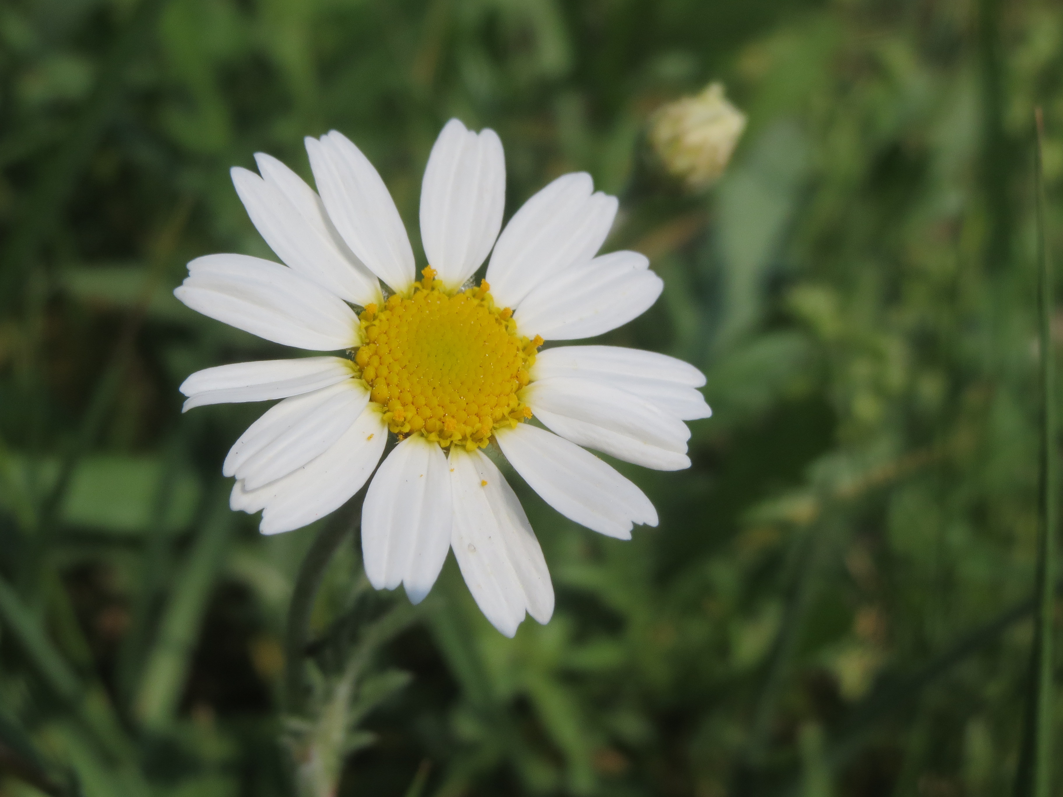 Hundskamille (Anthemis arvensis) bei Hockenheim